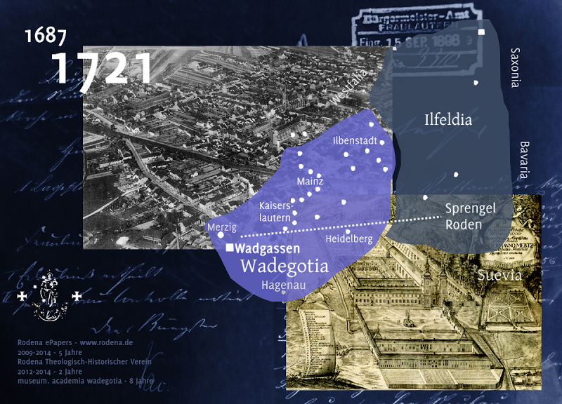 Von mir erstelltes Postkartenlayout für den Rodena Theologischen-Verein ( Dargestellt ist Roden und die Alte Abtei Wadgassen sowie das "Einzugsgebiet" der Wadgasser Abtei. Die Jahreszahlen verweisen auf die Zeitspanne, in der Roden zu Wadgassen gehörte.